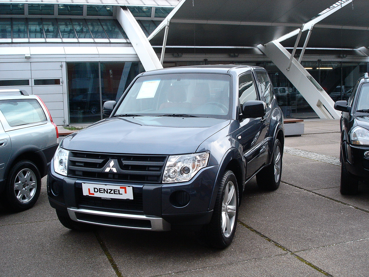 Mitsubishi Pajero 2007